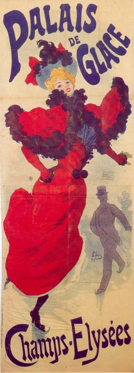 Plakat "Palais de Glace, Champs-Elysées".